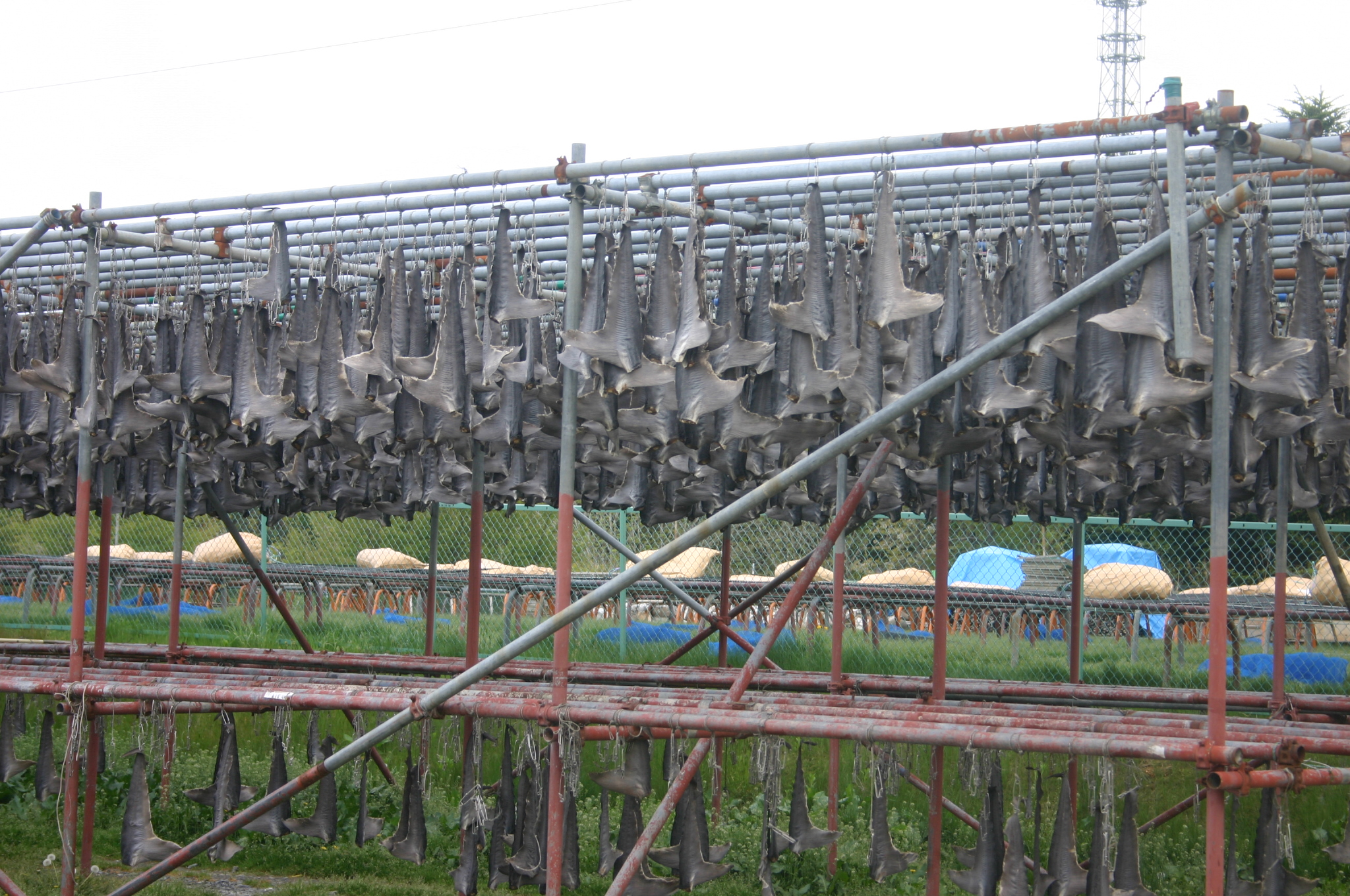 気仙沼で、干されているフカヒレ